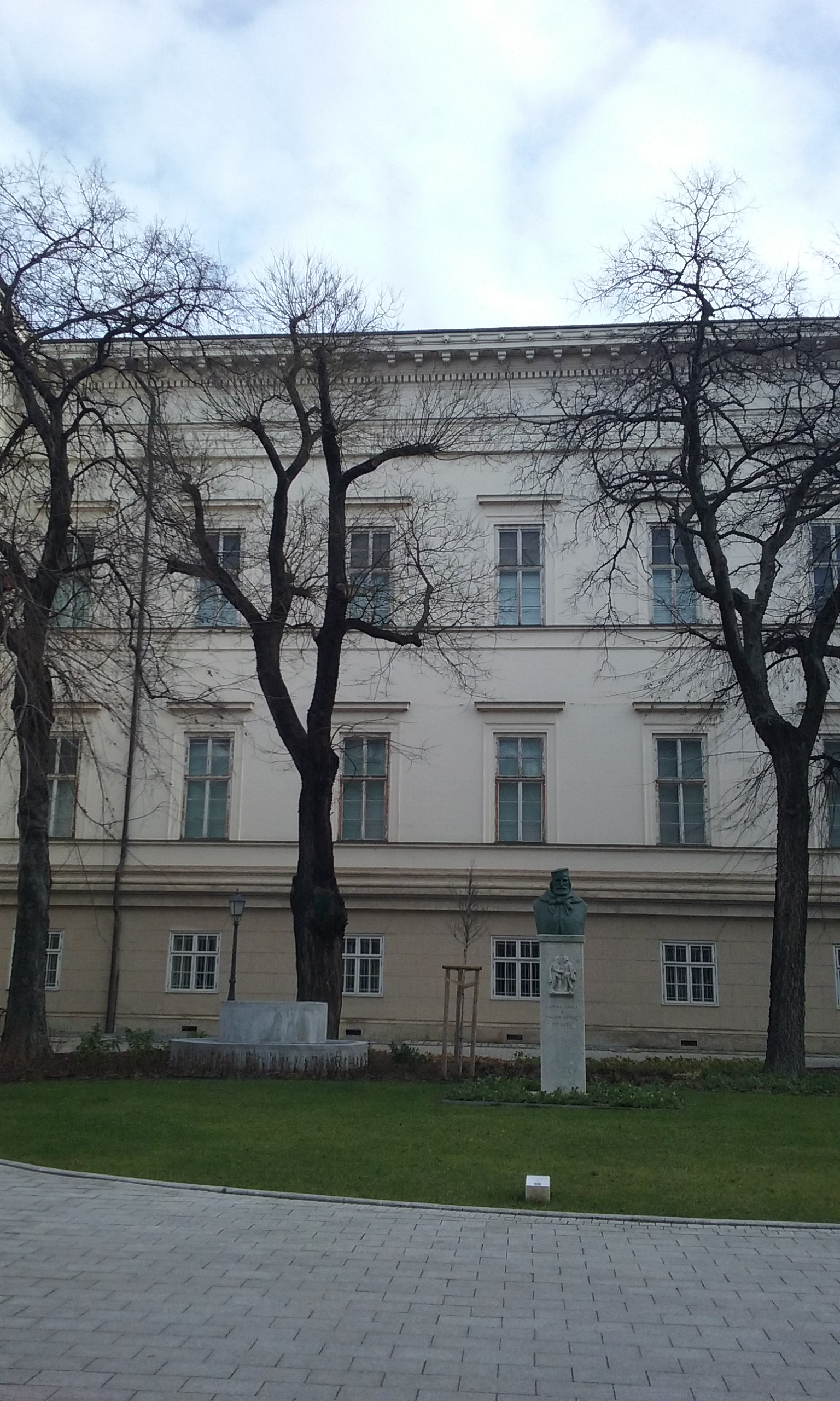 A budapesti Múzeumkert egyik legöregebb fája, a múzeum főhomlokzata előtti japánakác